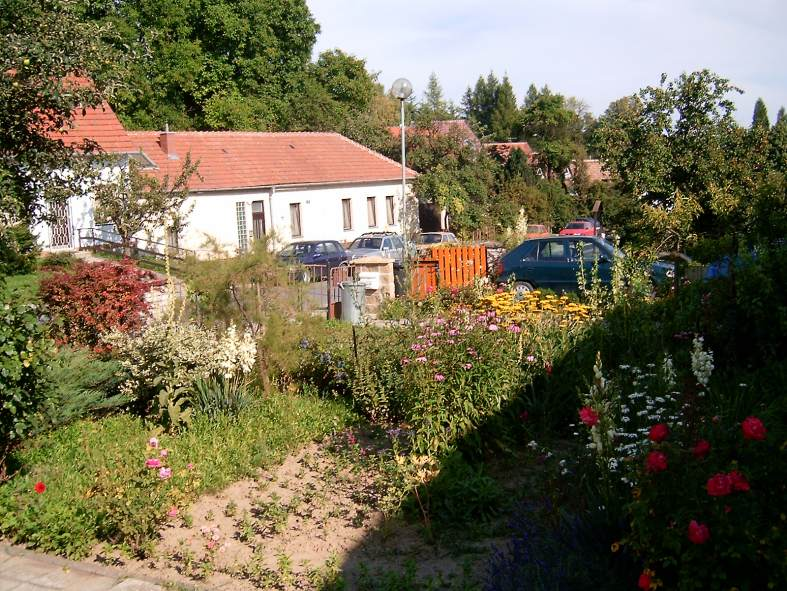 Brno-Komín, Chaloupky